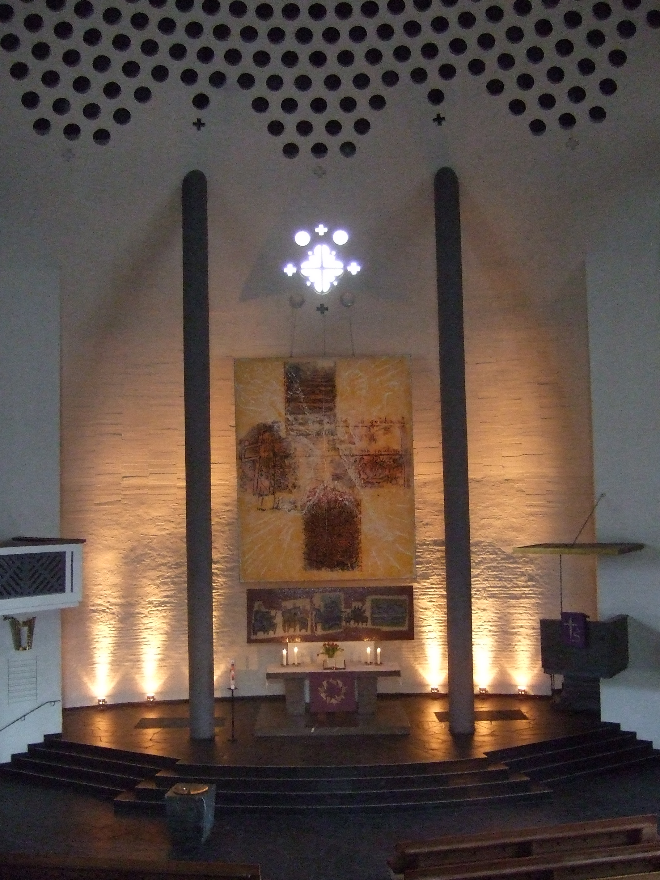 Kreuzkirche Kassel Altarraum